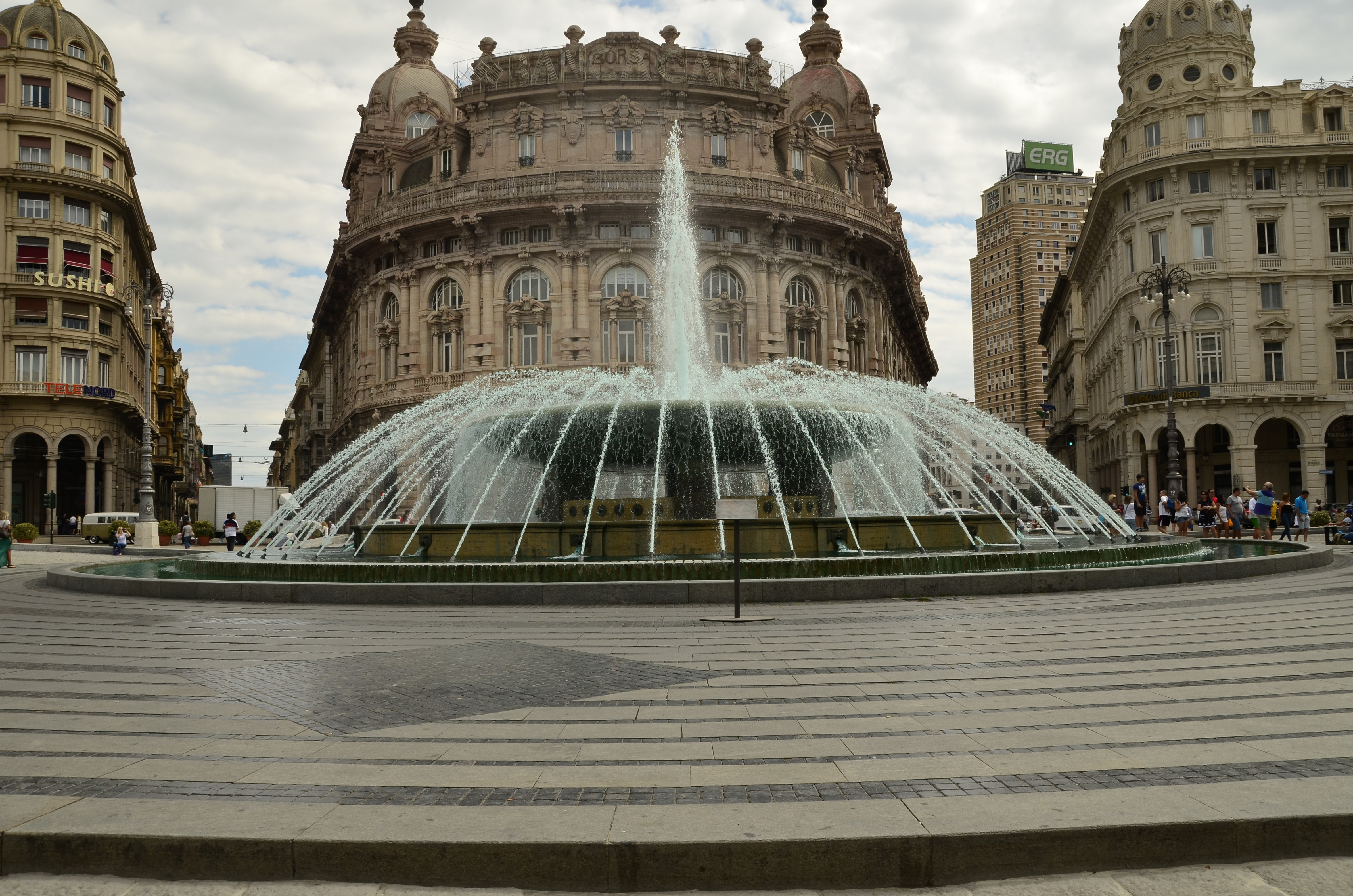 Fontana di Piazza De Ferrari This is a photo of a monument which is part of cultural heritage of Italy.